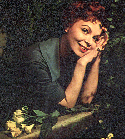 Ulla Sallert (1923–2018)